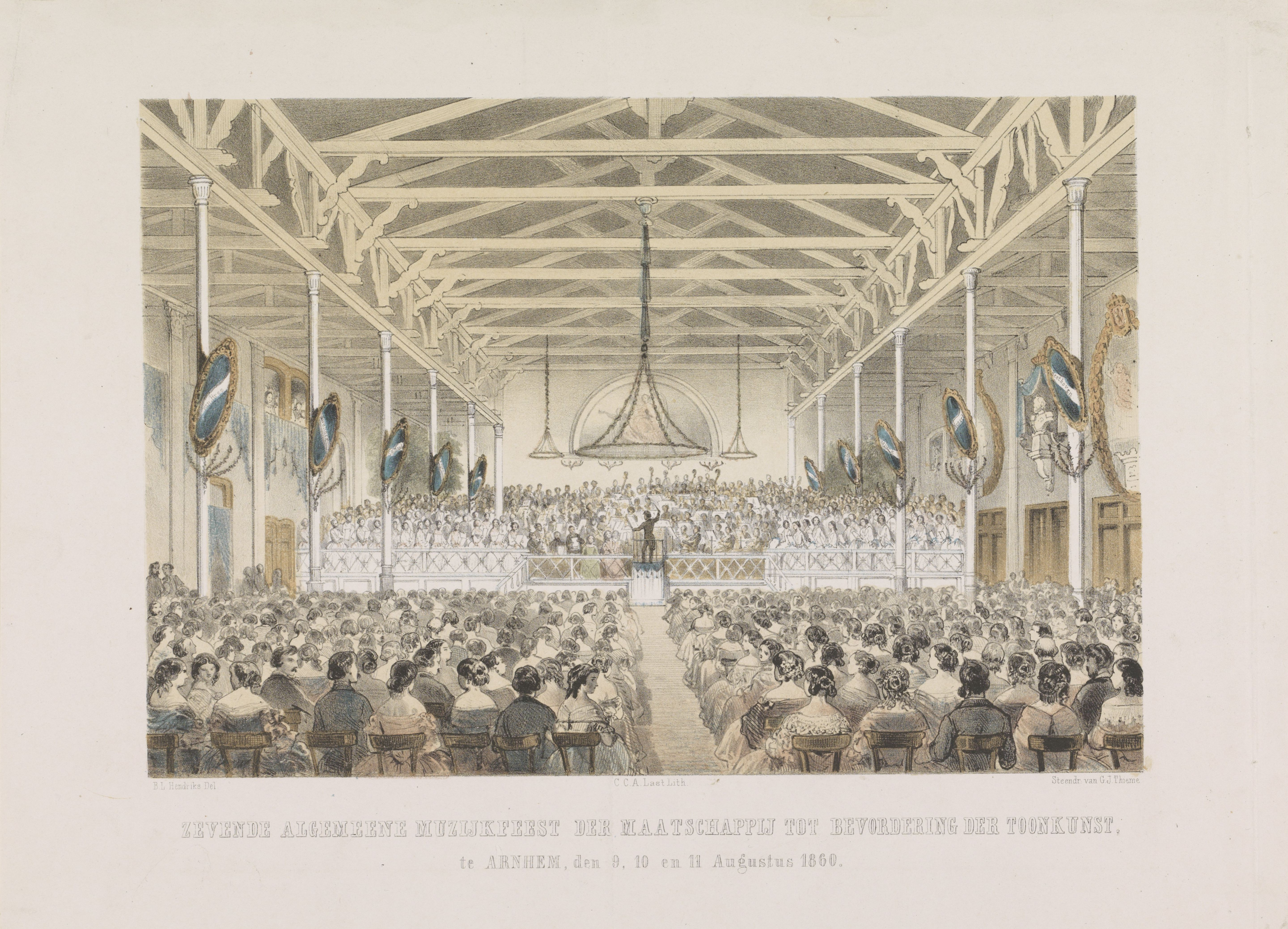 IdentificatieTitel(s): Zevende Algemeene Muzijkfeest der Maatschappij tot Bevordering der Toonkunst, te Arnhem, den 9, 10 en 11 Augustus 1860 (titel op object)Objecttype: prent Objectnummer: RP-P-OB-89.100Catalogusreferentie: FMH 7292-AAtlas van Stolk 12Opschriften / Merken: verzamelaarsmerk, verso, gestempeld: Lugt 2228Omschrijving: Gezicht in de grote concertzaal van Musis Sacrum tijdens de Zevende Algemene Muziekfeest georganiseerd door de Maatschappij tot Bevordering der Toonkunst, te Arnhem 9-11 augustus 1860.VervaardigingVervaardiger: prentmaker: Carel Christiaan Antony Last (vermeld op object)naar tekening van: Barend Leonardus Hendriks (vermeld op object)drukker: Gerrit Jan Thieme (vermeld op object)Plaats vervaardiging: prentmaker: Nederlandnaar tekening van: Nederlanddrukker: AmsterdamDatering: 1860Fysieke kenmerken: kleurenlithografie in diverse kleurenMateriaal: papier Techniek: kleurenlithografie (procedé)Afmetingen: blad: h 260 mm × b 355 mmToelichtingVolgens Muller gebruikt als illustratie in: J.W. Staats Evers, Gedenkboek der muzijkfeesten ... [niet getraceerd].OnderwerpWat: concert halllarge group of musicians, orchestrachoirWanneer: 1860-08-09 - 1860-08-11Waar: ArnhemMusis SacrumWie: Maatschappij tot Bevordering der ToonkunstVerwerving en rechtenVerwerving: aankoop 1881Copyright: Publiek domein